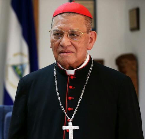 Cardenal Nicaragüense Miguel Obando y Bravo